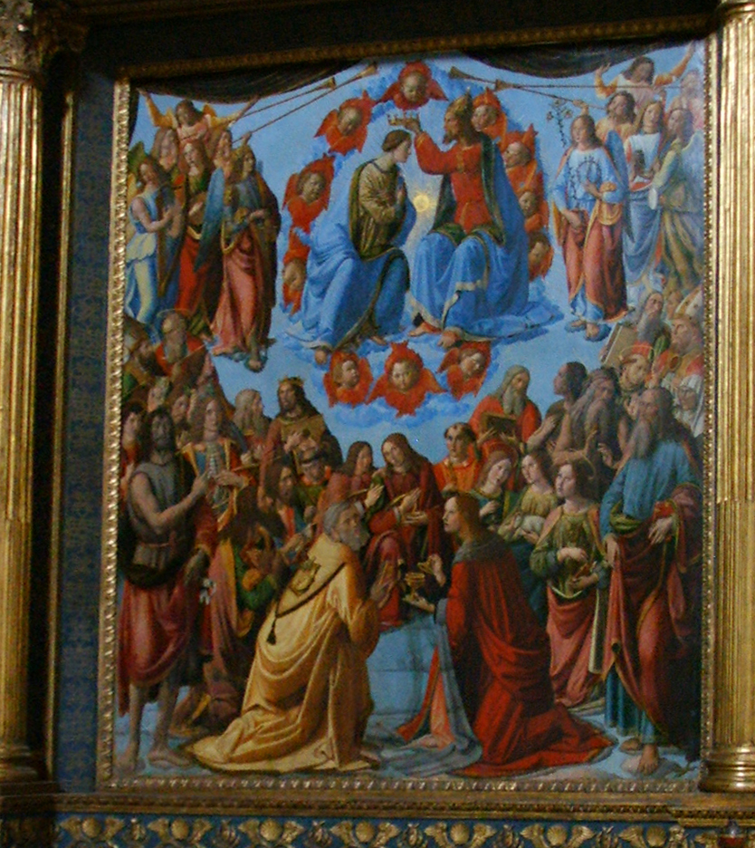 Santa_Maria_Maddalena_de'_Pazzi cosimo_rosselli,_incoronazione_della_vergine_(1505) in Florence